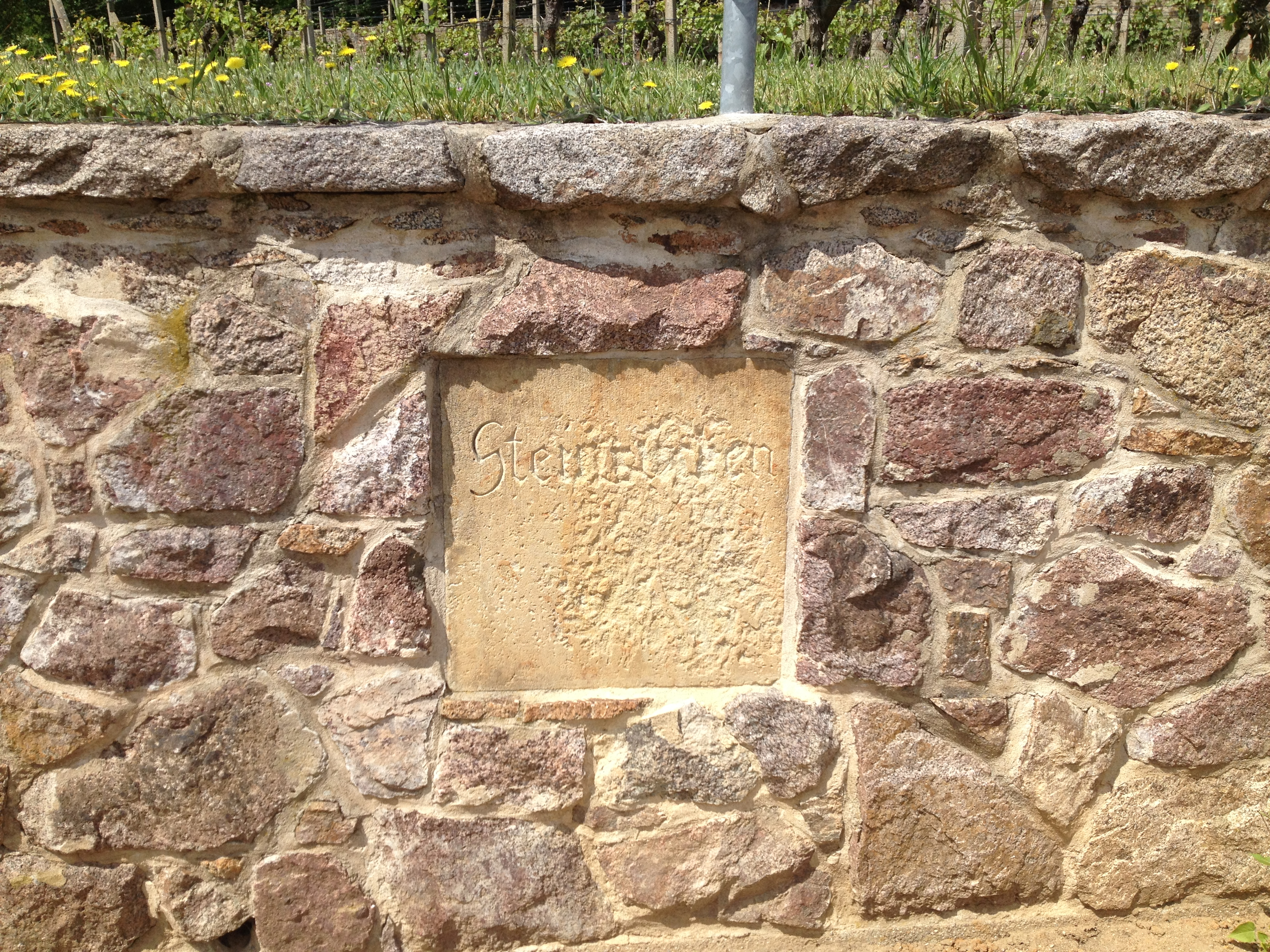 Radebeul Winzerei Förster Umfassungsmauer: Beschriftung "Steinrücken"